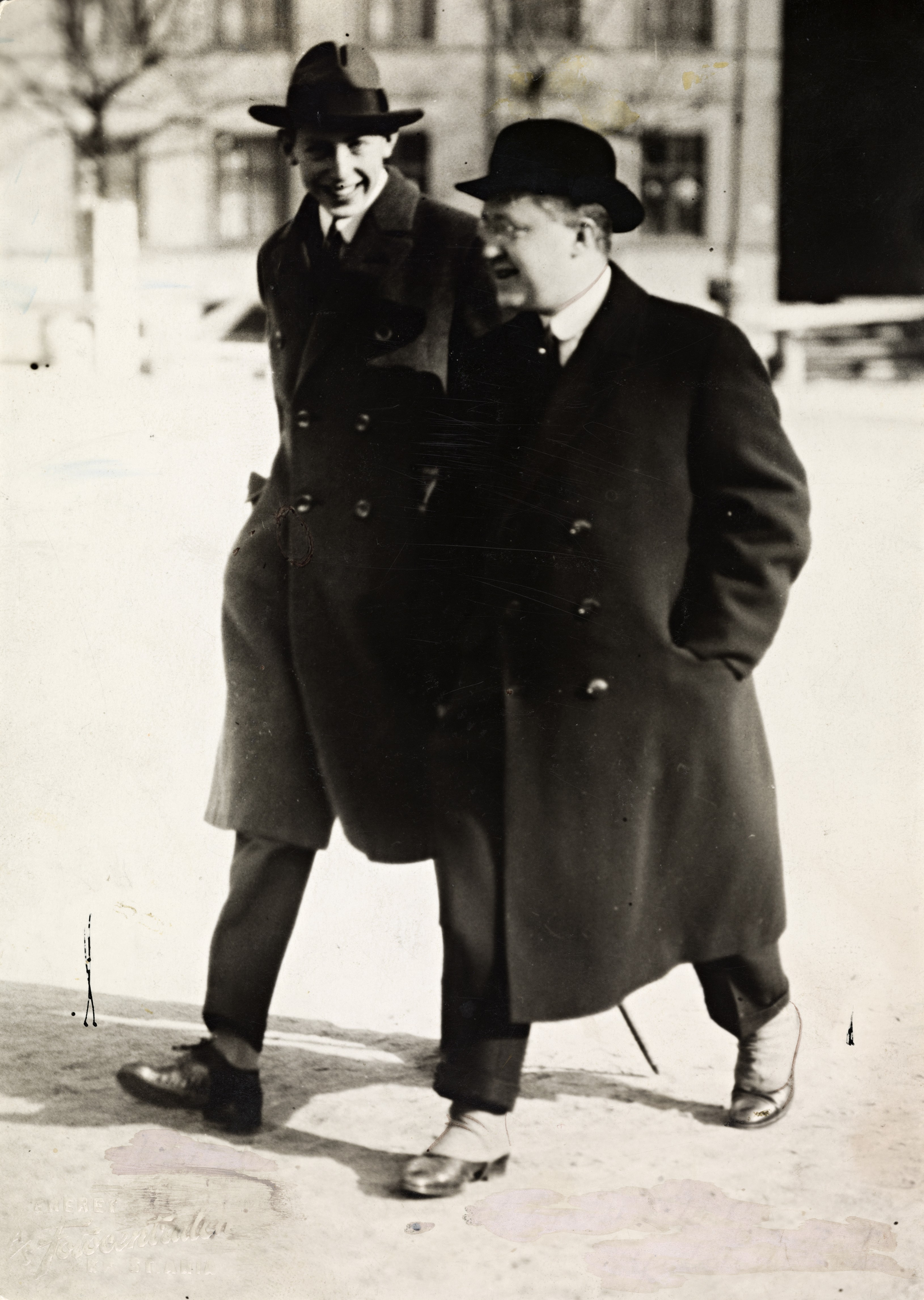 Beskrivelse / Description: Harald Grieg var journalist og forlagsmann. Da Gyldendals norske avdeling i 1925 på Griegs initiativ gikk over til norske eiere, ble Grieg direktør for det nye aksjeselskapet, Gyldendal Norsk Forlag A/S, en stilling han hadde til 1970 (kilde: snl.no). Nordahl Grieg var forfatter. Han var også utdannet offiser og deltok som krigskorrespondent i flytokter over Atlanterhavet og Nordsjøen. Han ble drept da flyet han satt i ble skutt ned over Berlin 2. desember 1943 (kilde: snl.no). Bildet stammer fra Gyldendals historiske portrettarkiv. Dato / Date: 1922 Sted / Place: Oslo Fotograf / Photographer: Fotocentralen A/S (Kristiania) Digital kopi av original / Digital copy of original: s/h papirpositiv Eier / Owner Institution: Nasjonalbiblioteket / National Library of Norway Lenke / Link: Bildesignatur / Image Number: blds_05990